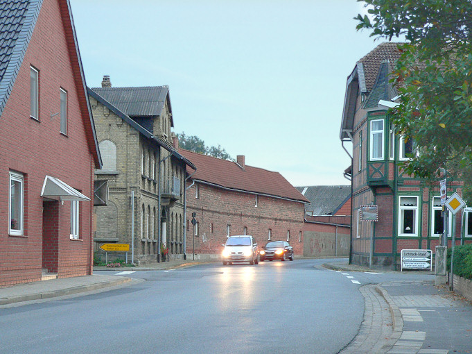 Parsau, Kreuzung im Ort